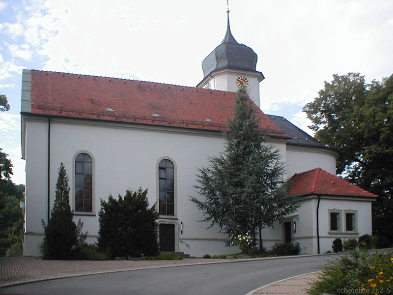 Kath. Kirche in Billigheim-Allfeld